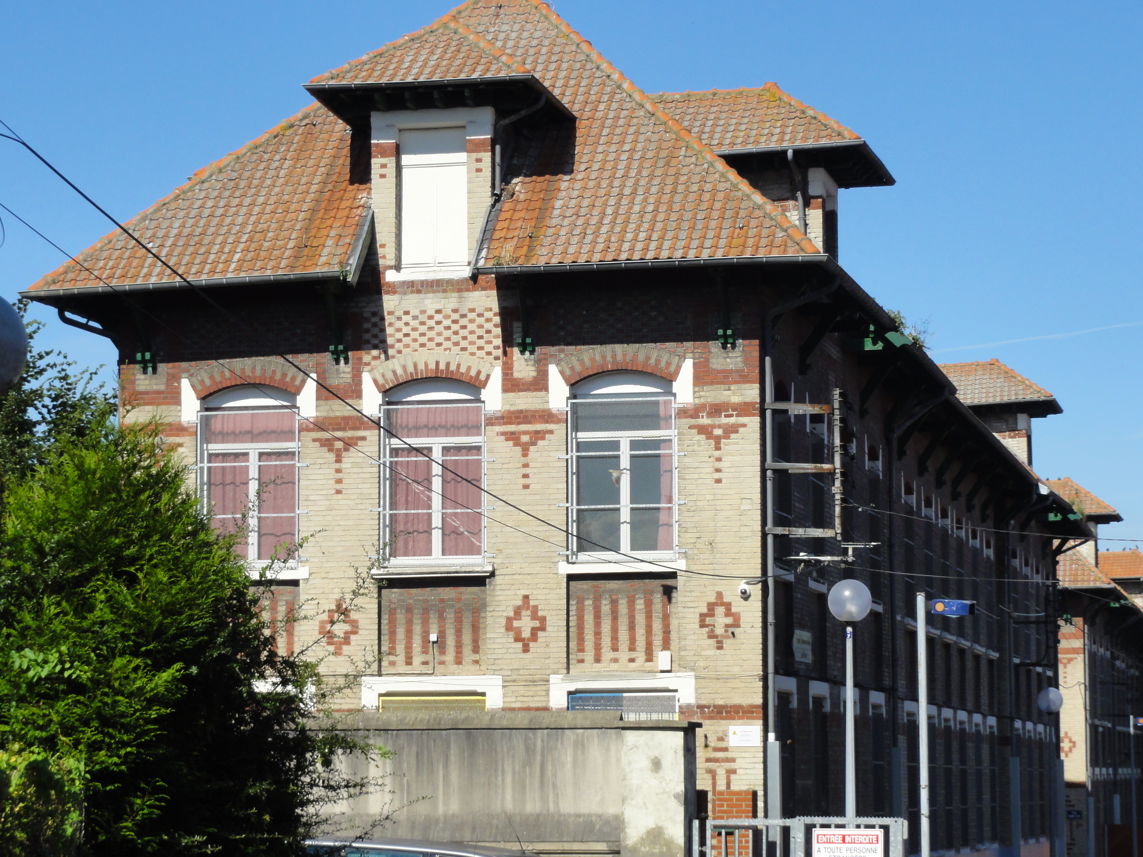 Écoles des cités de la fosse n° 4 de la Compagnie des mines de Lens dans le bassin minier du Nord-Pas-de-Calais, Lens, Pas-de-Calais, Nord-Pas-de-Calais, France.